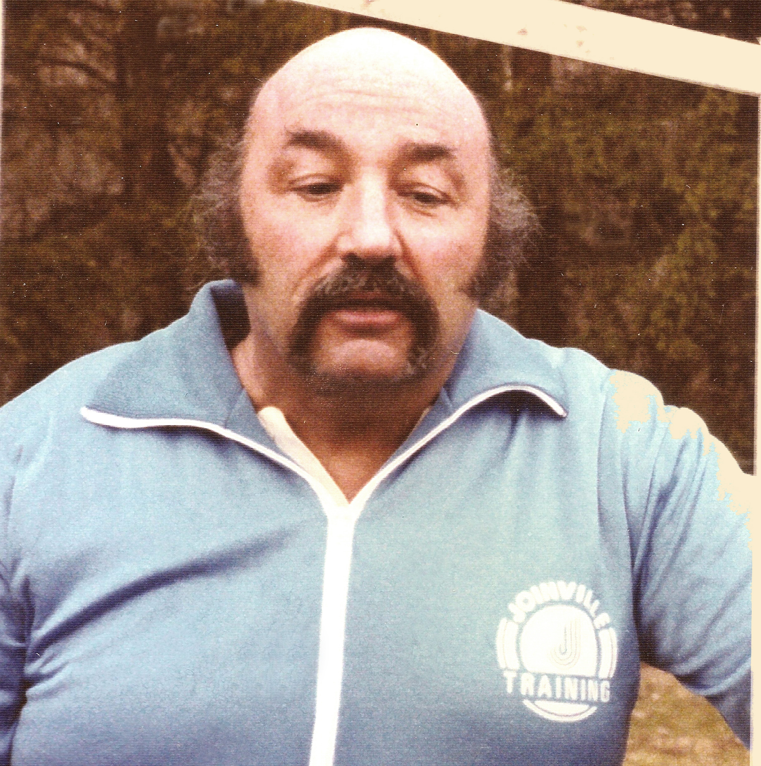 Jean Constantin - Training quotidien